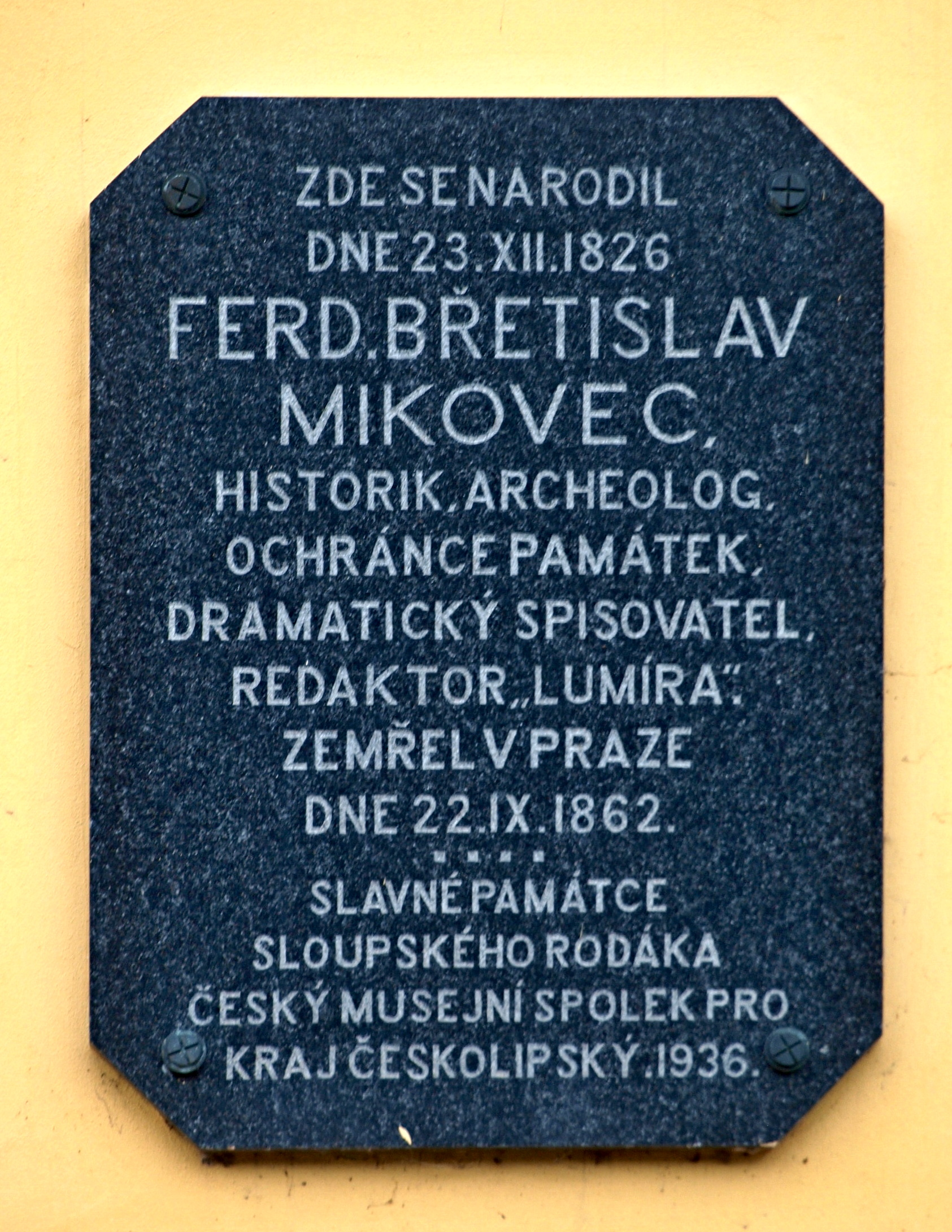 Rodný dům F. B. Mikovce, Sloup v Čechách